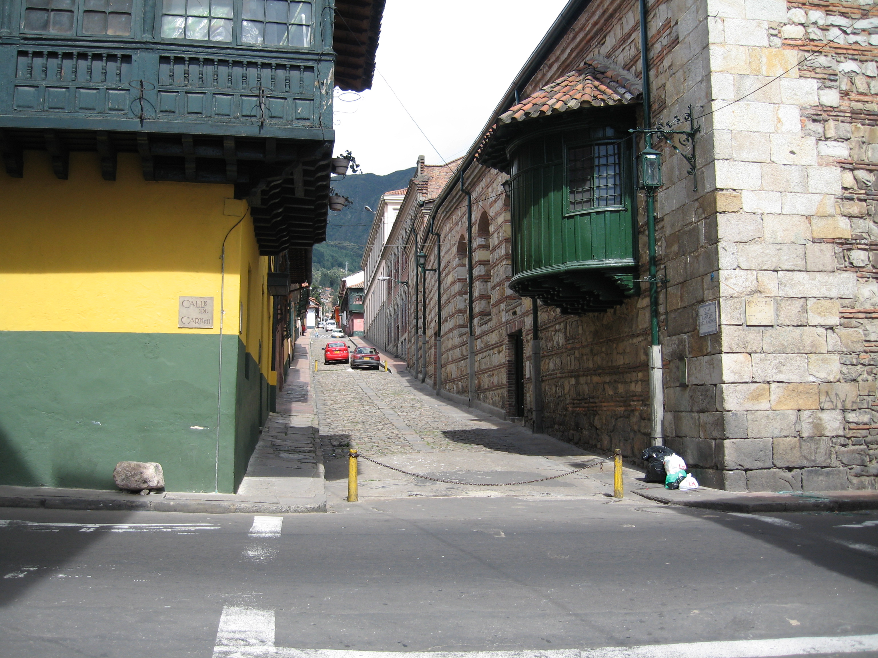 A la derecha se puede observar el Camarin del Carmen antiguo monasterio de las carmelitas descalzas